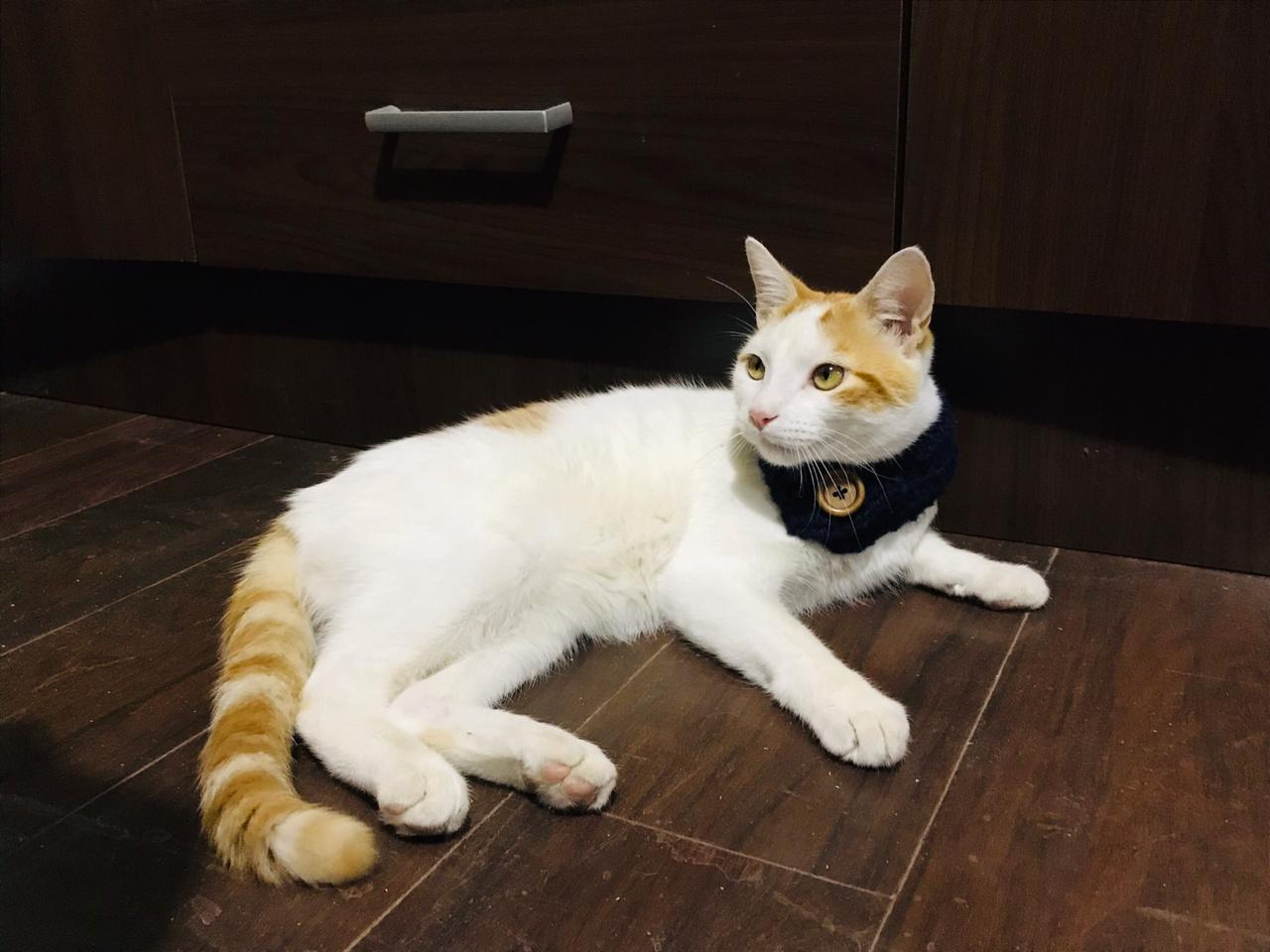 THEO Es un gato van turco de 7 meses